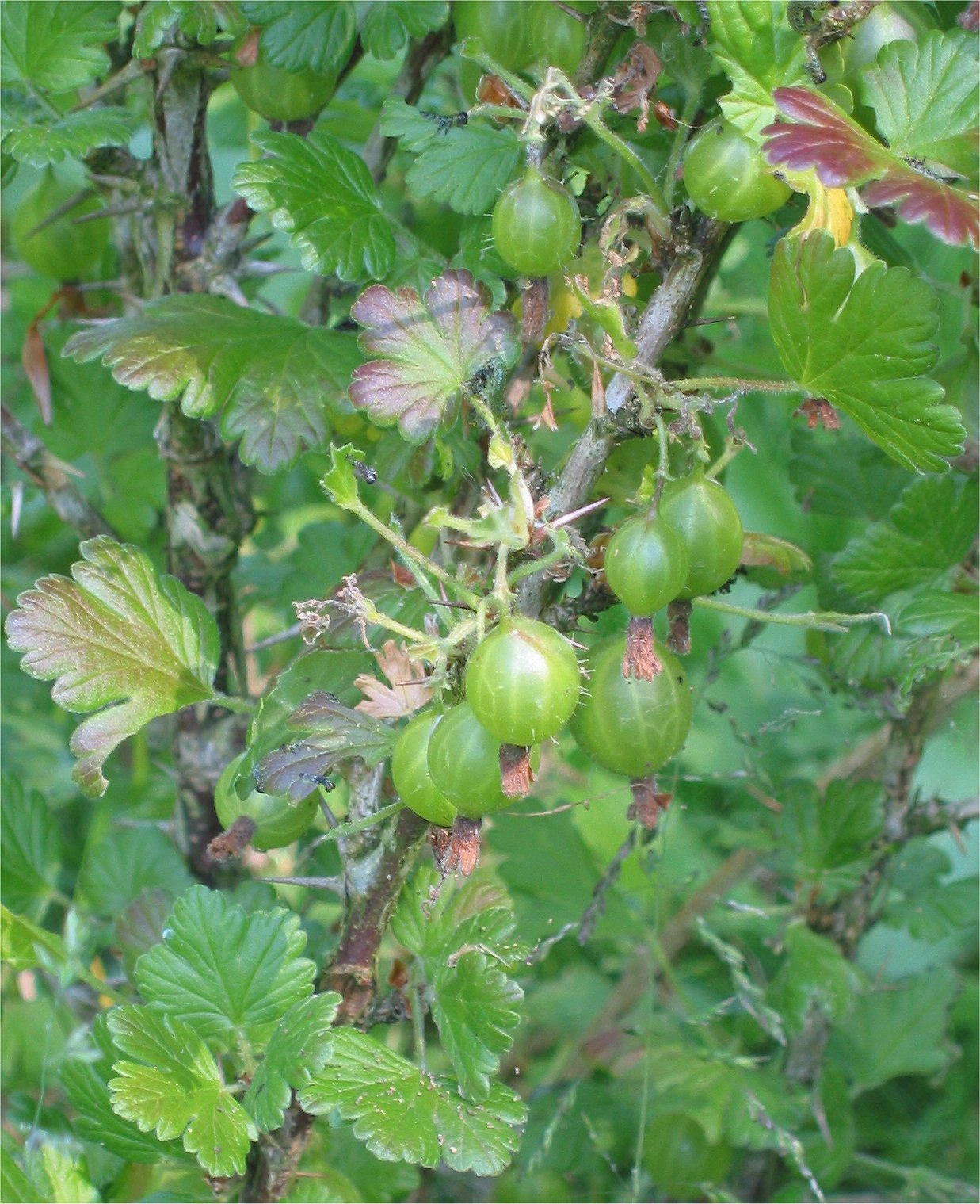 (nl: Wilde kruisbes bessen) Ribes uva-crispa wild plant